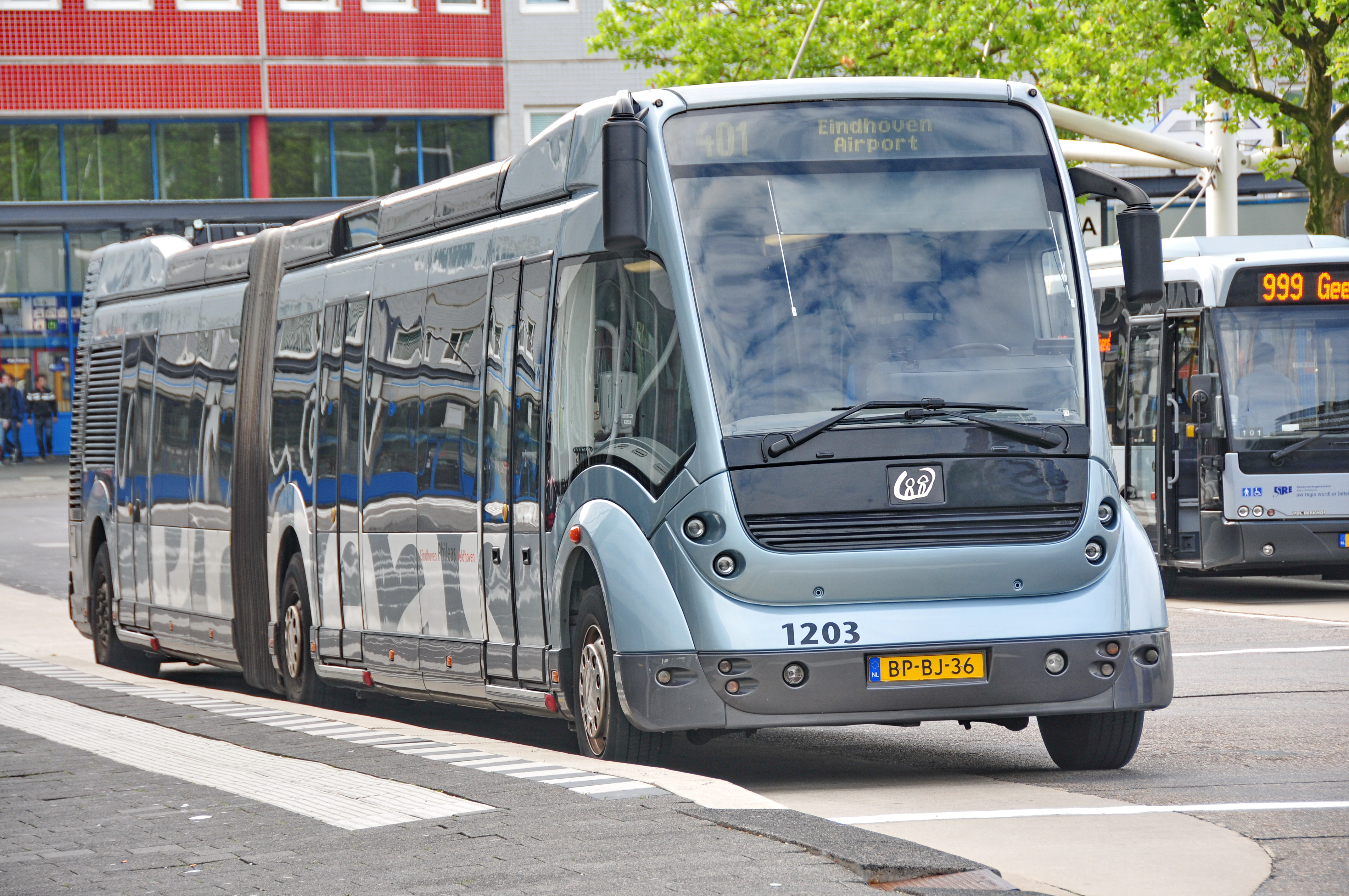 Eindhoven, Niederlande, 2013